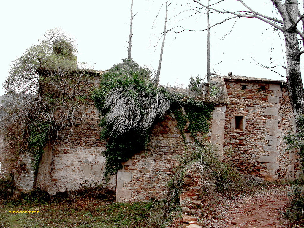 Església de Sant Pau de Montmany (Vallès Oriental-Catalunya).